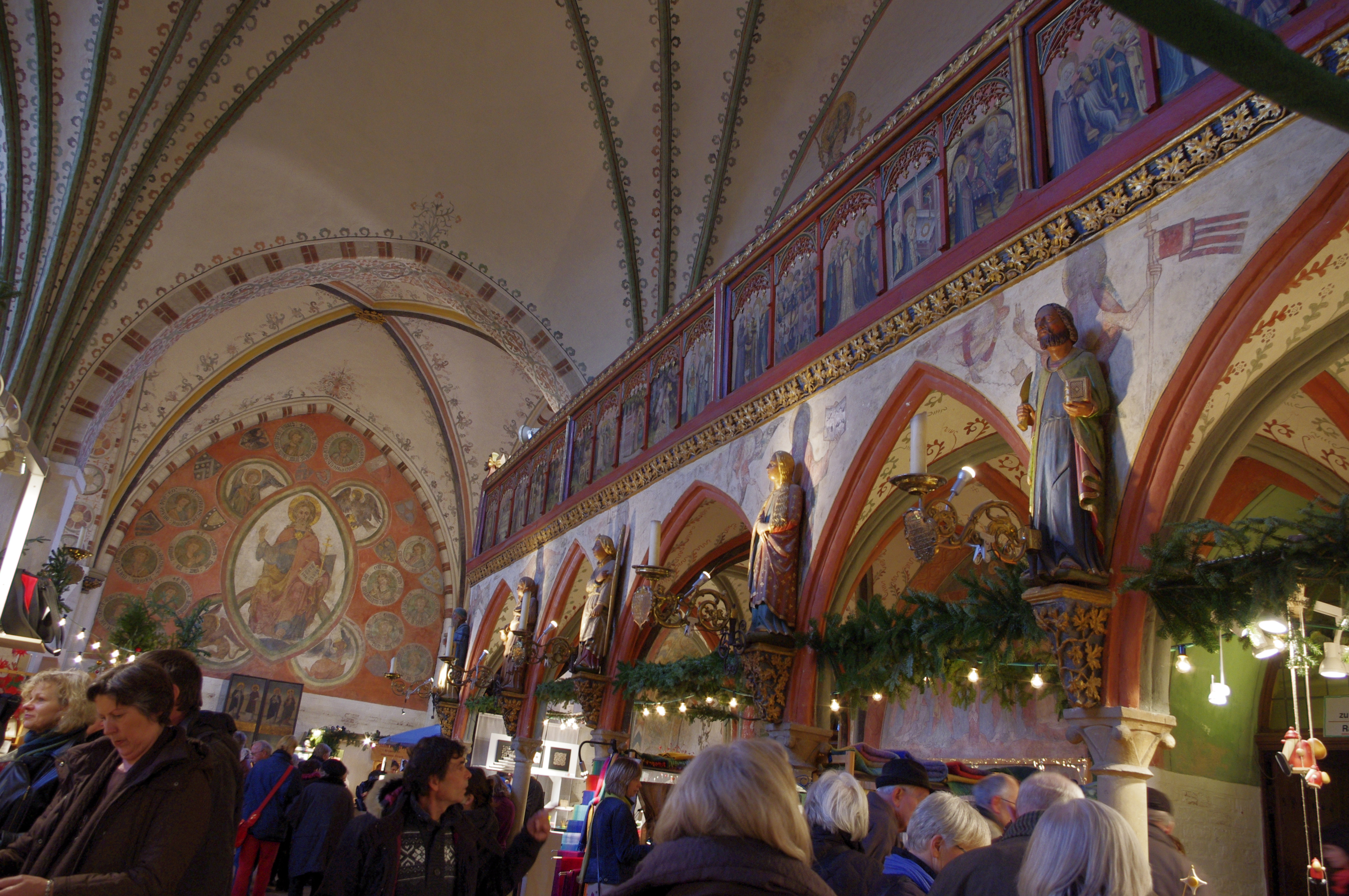 Heiligen Geist Hospital, Lübeck während des Weihnachtsmarktes 2011.